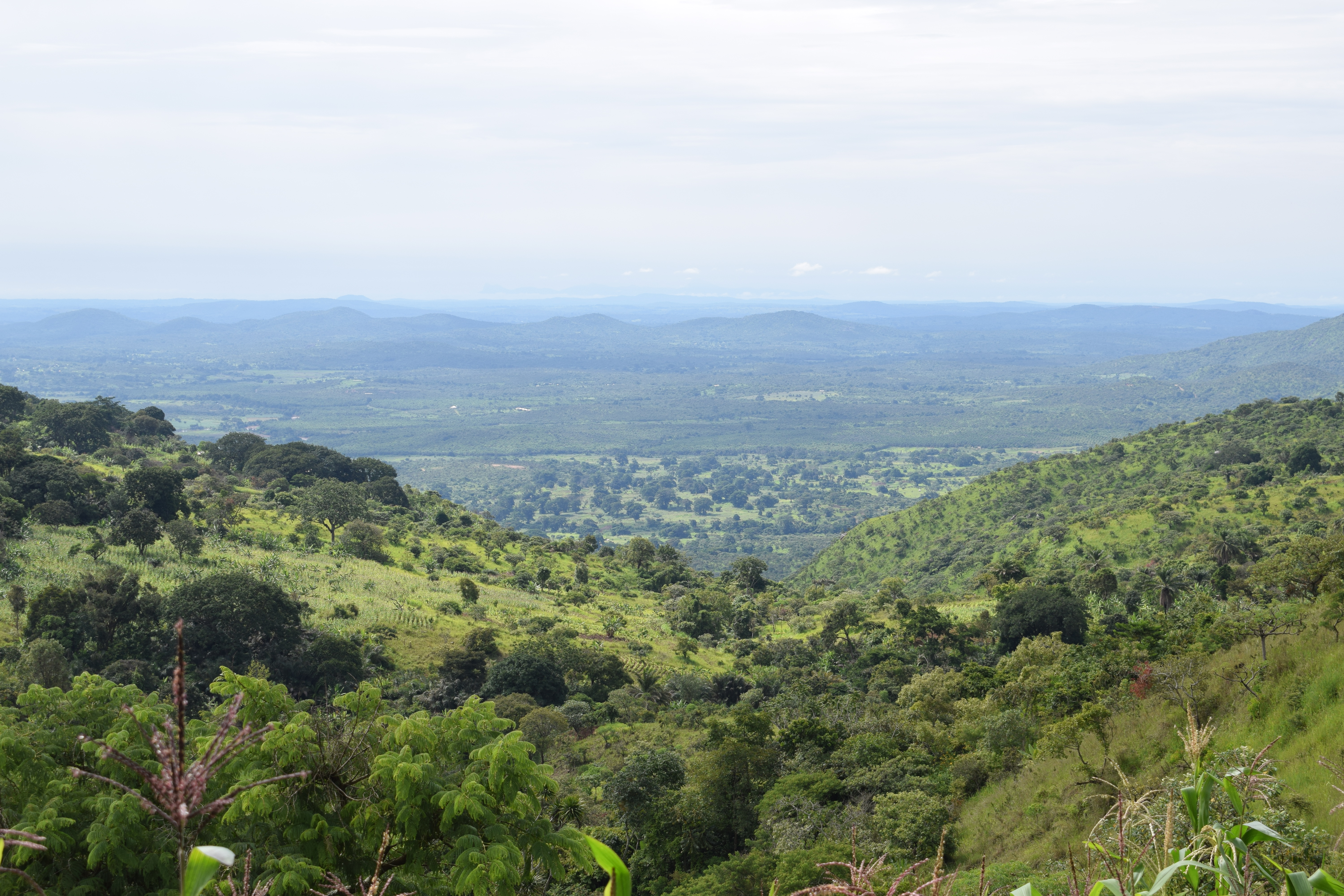 Une vue de la vallée du Noun depuis le village Bandjoun à l'Ouest du Cameroun